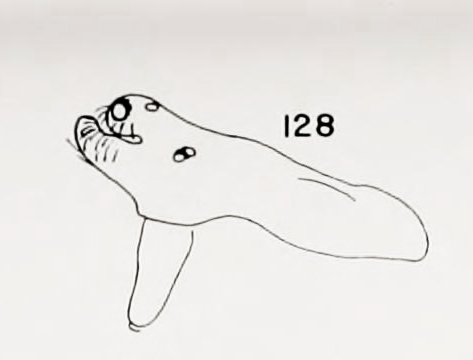 Argyrodes Elevatus caparazon del macho